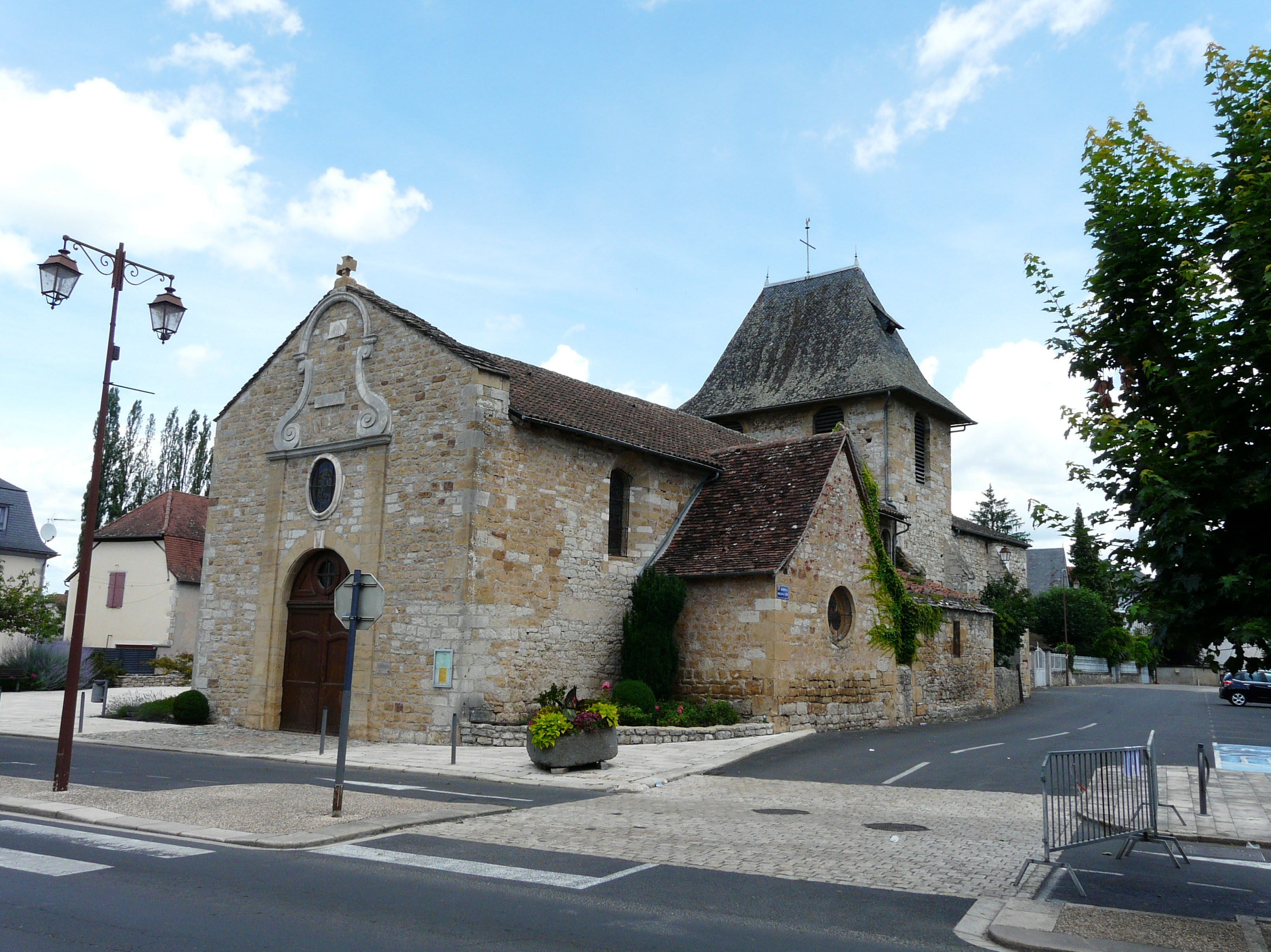 L'église Sainte-Catherine, Bretenoux, lot, France.